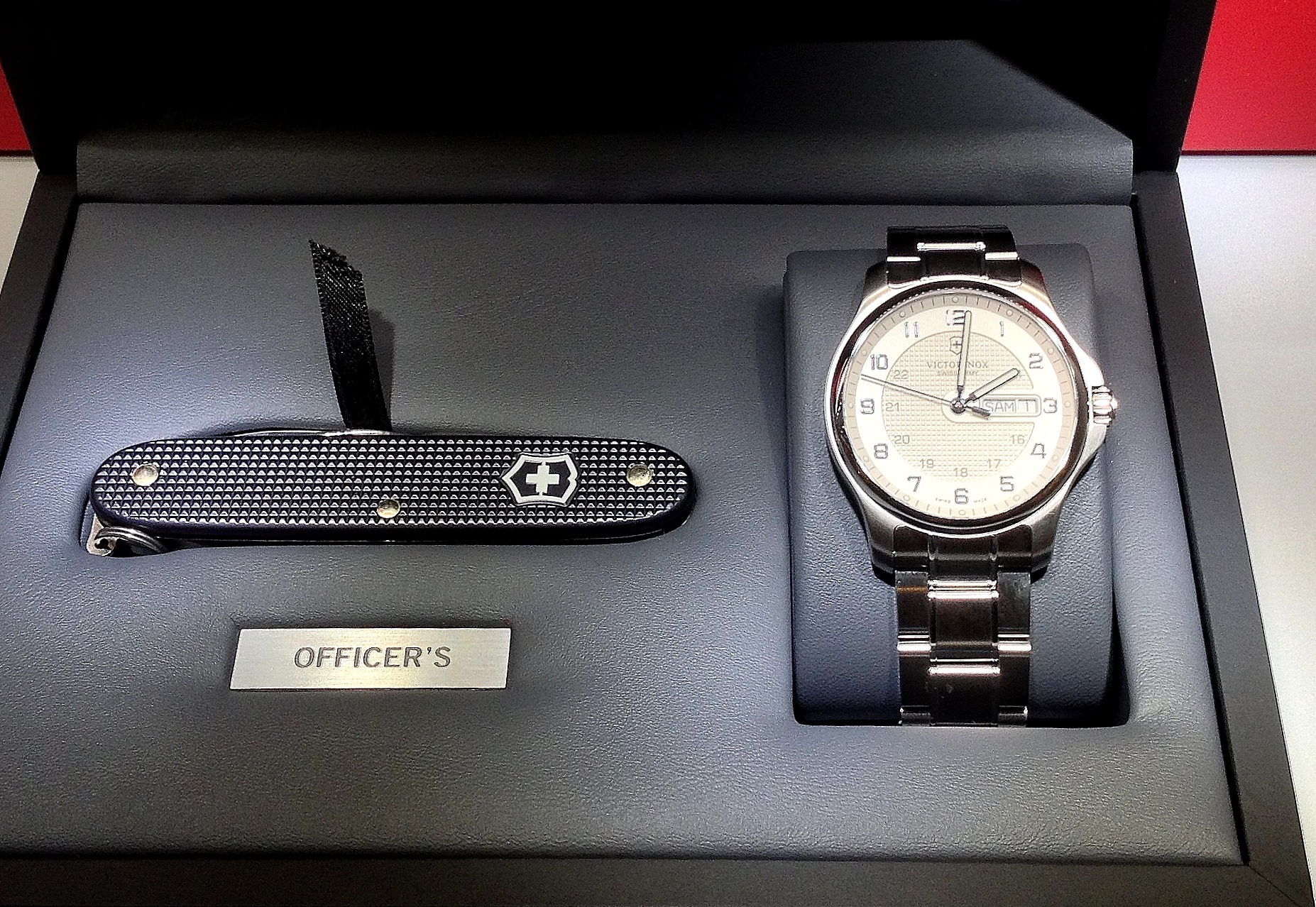 Swiss made, boîtier en acier inoxydable, fond vissé, étanche à 100 mètres, verre saphir résistant aux rayures.